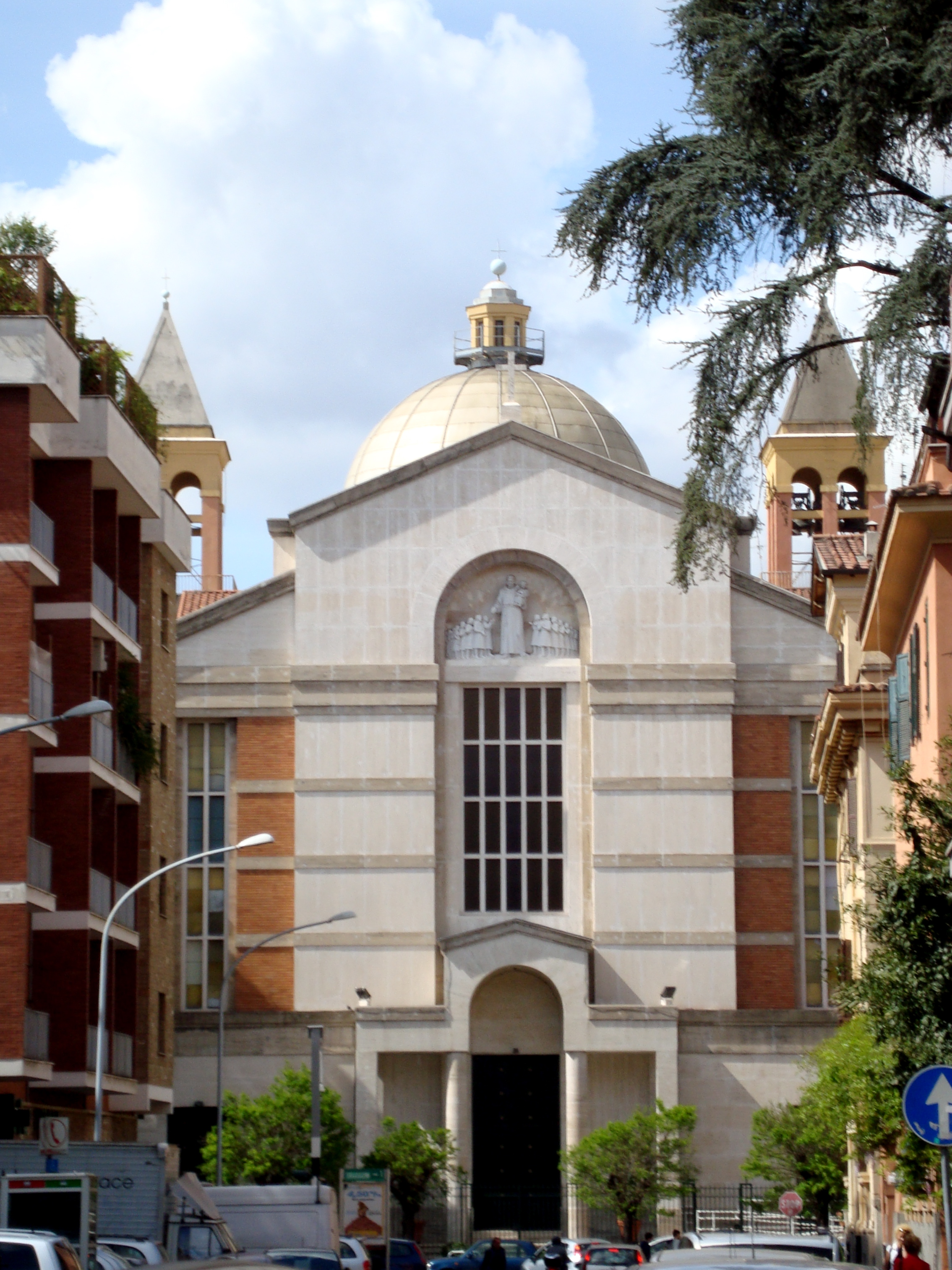 L'église de Sant'Antonio da Padova a Circonvallazione Appia dans le quartier Appio Latino à Rome